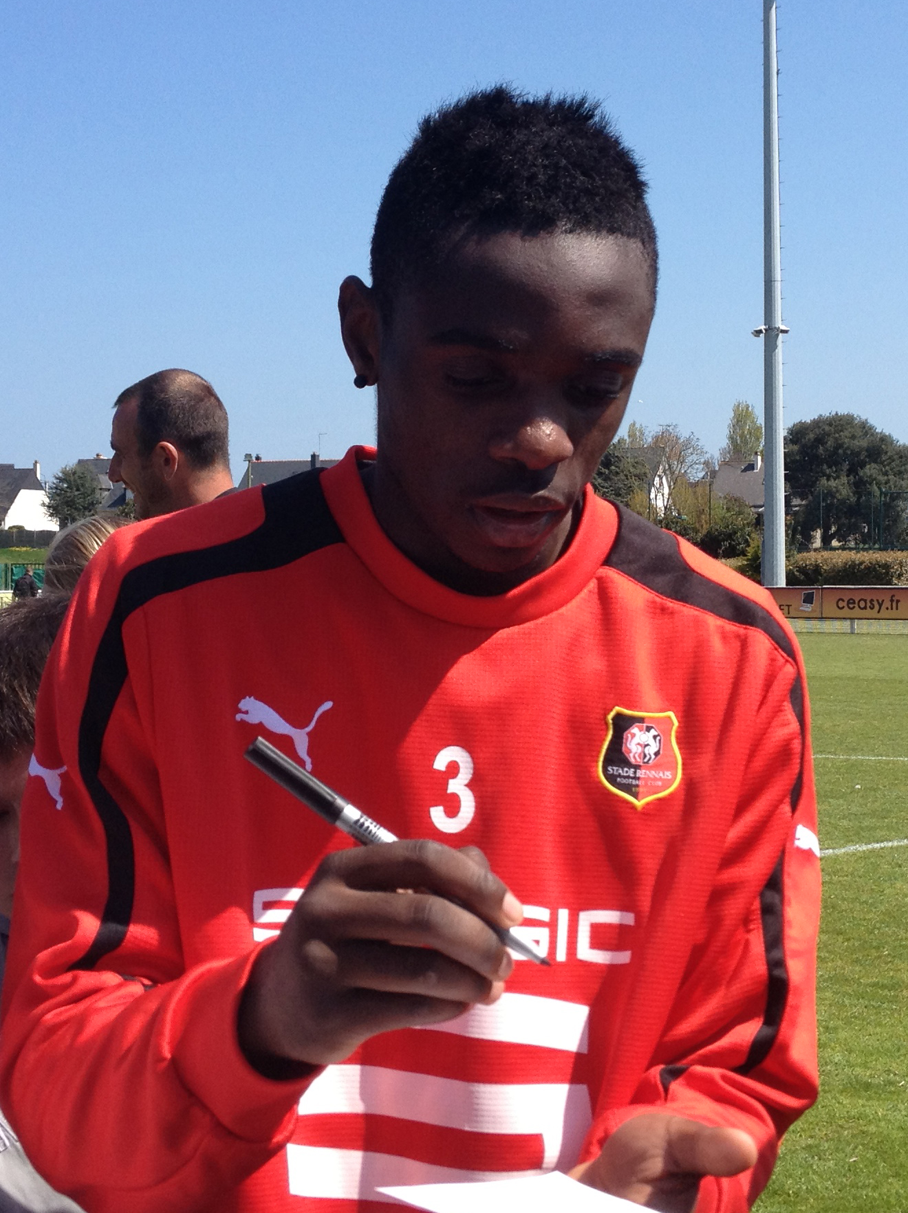 Photo prise lors d'un entraînement du Stade rennais au stade de Marville de Saint-Malo le 3 mai 2013. Chris Mavinga répond aux sollicitations des supporters.